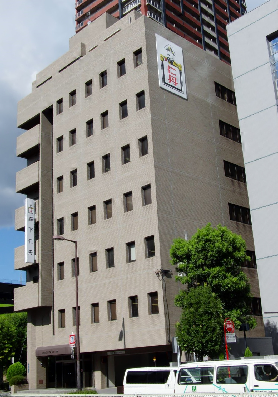 森下仁丹株式会社本社を撮影